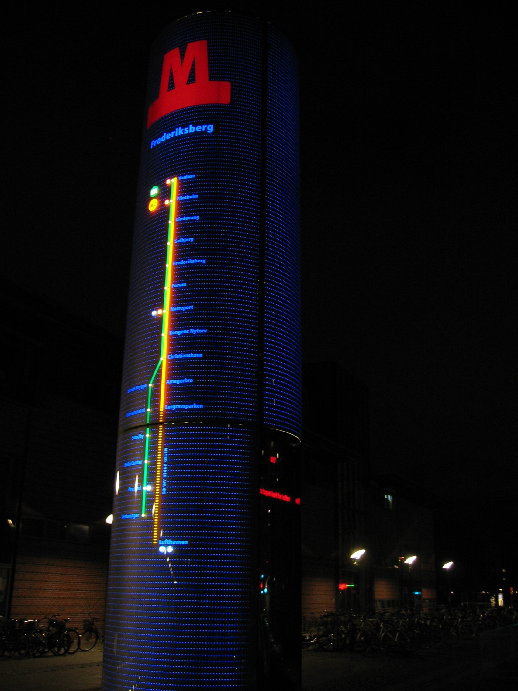 Metro Kopenhagen